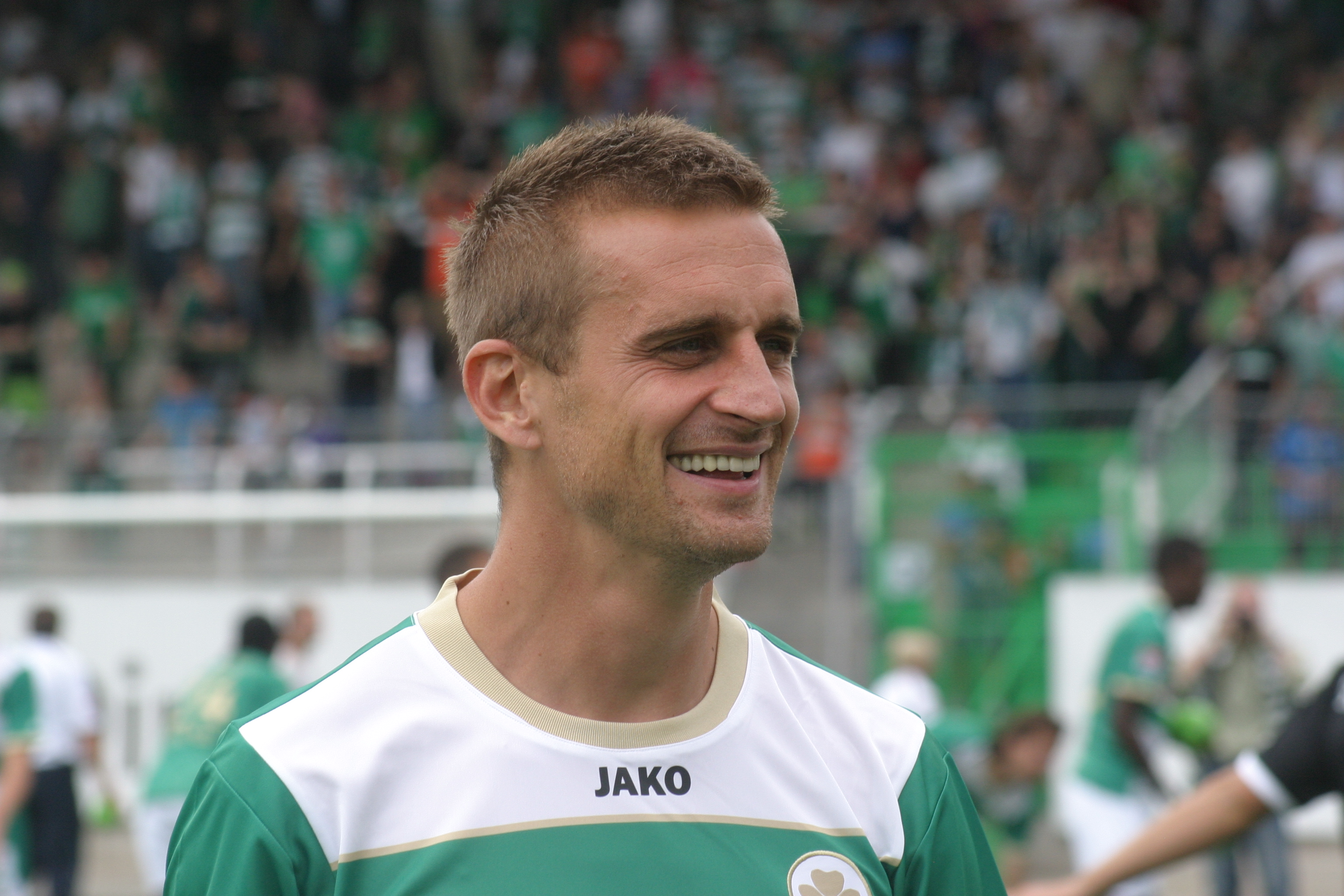 Milorad Pekovic